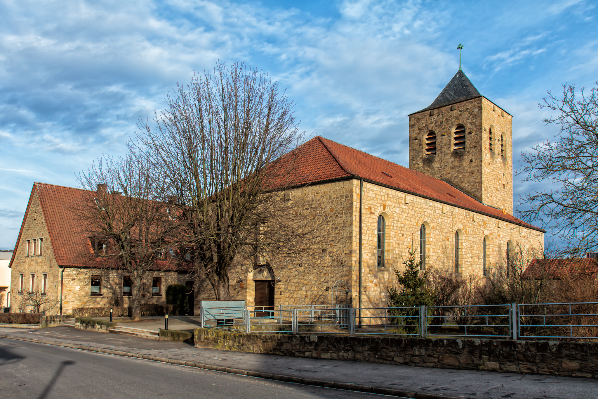 Kath. Pfarrkirche St. Elisabeth - Sennfeld - Bayern - 2012